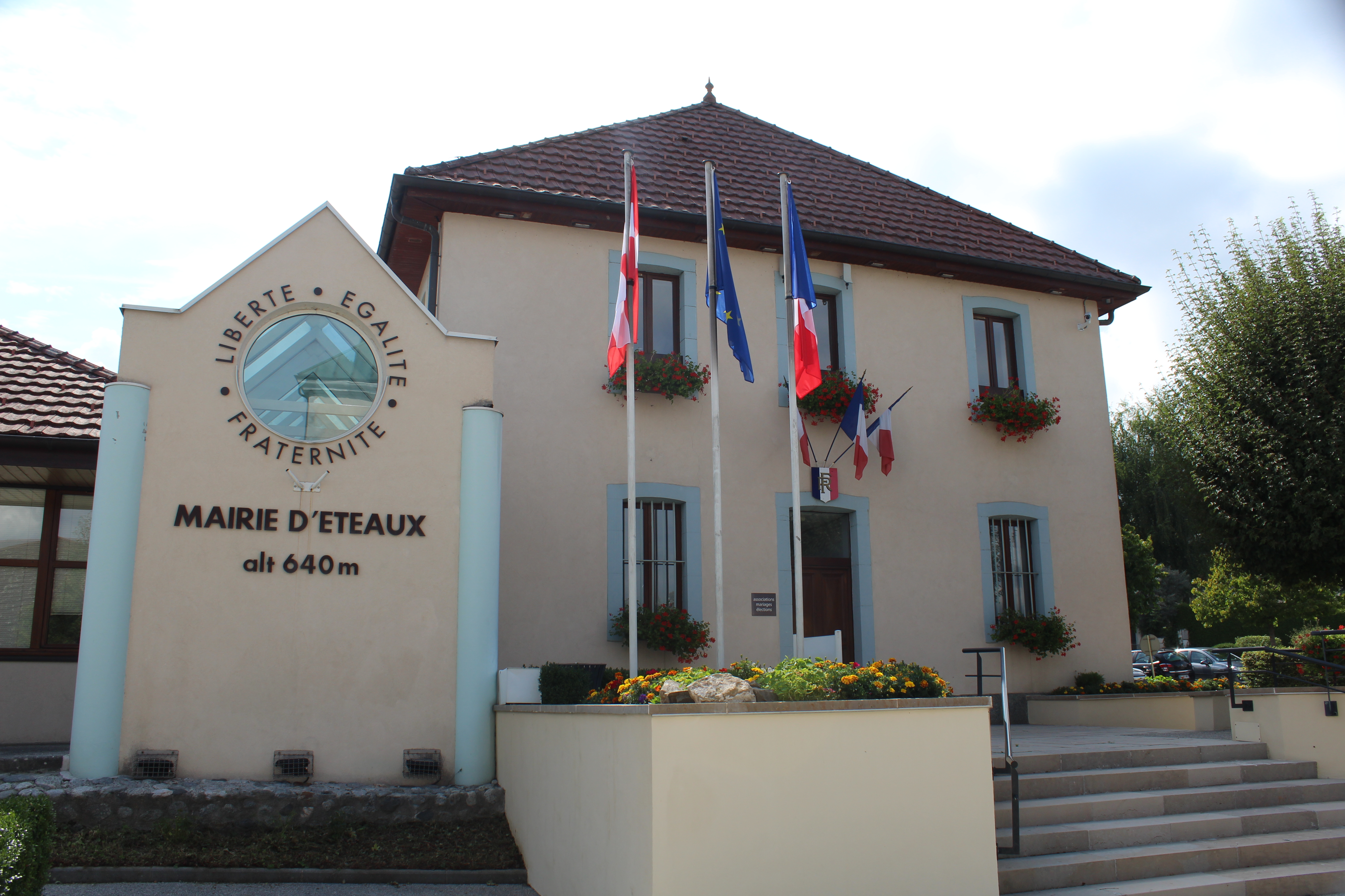 Mairie d'Etaux.